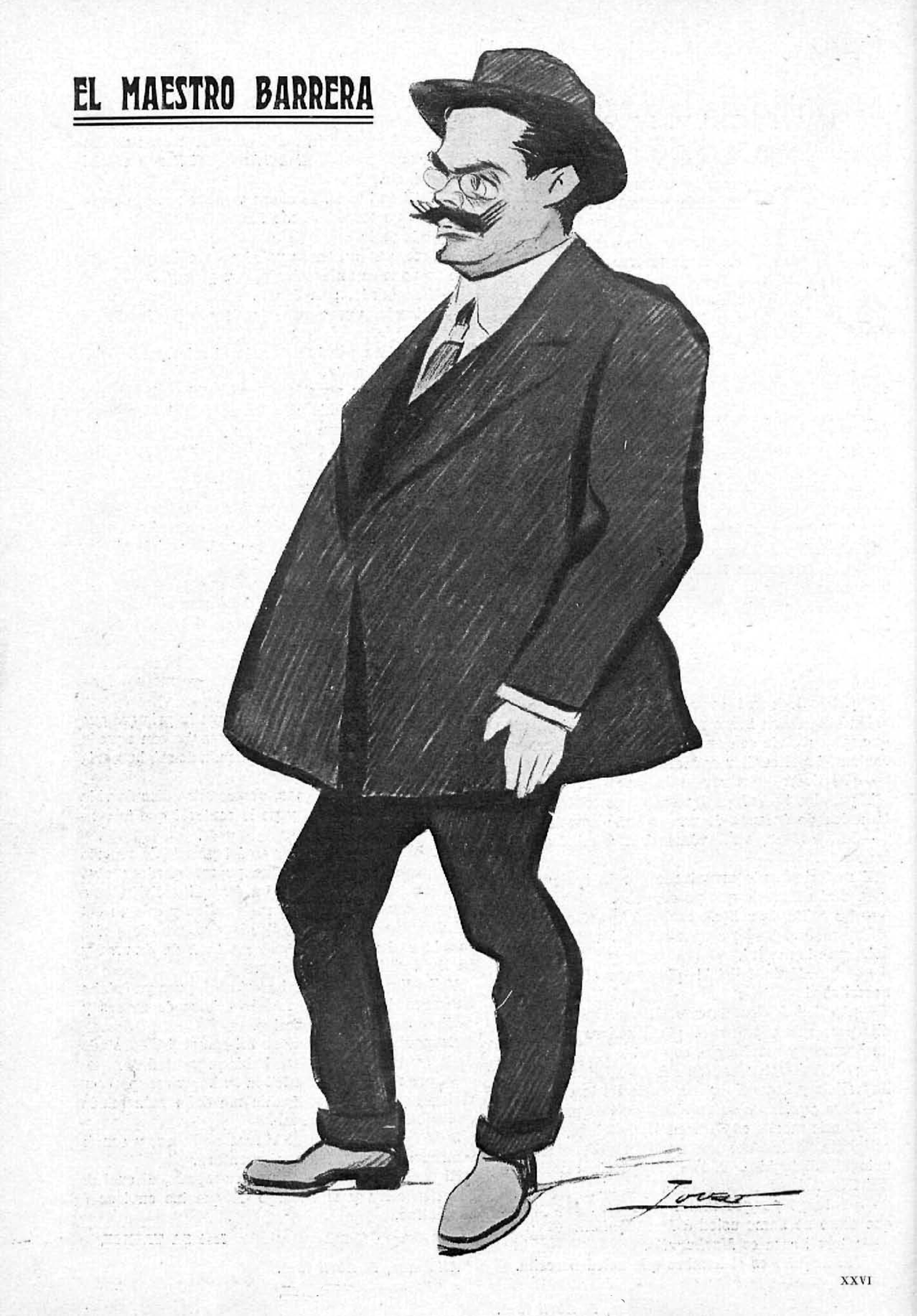 El maestro Barrera.